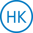 阪急神戸本線・伊丹線・今津線・甲陽線・（一部）神戸高速線の路線記号。DejaVuフォントで作成